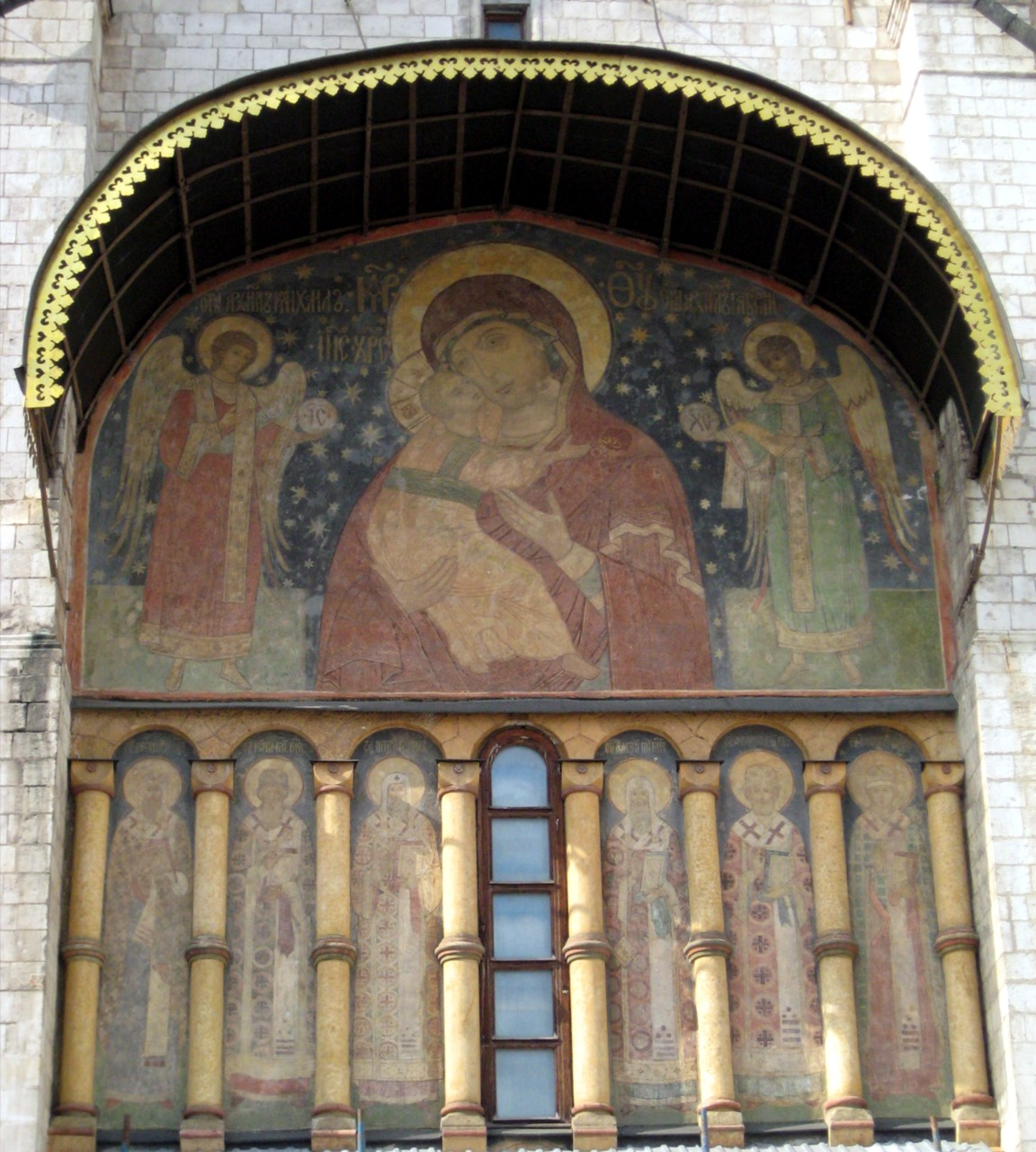 Фрески при входе в Успенский собор